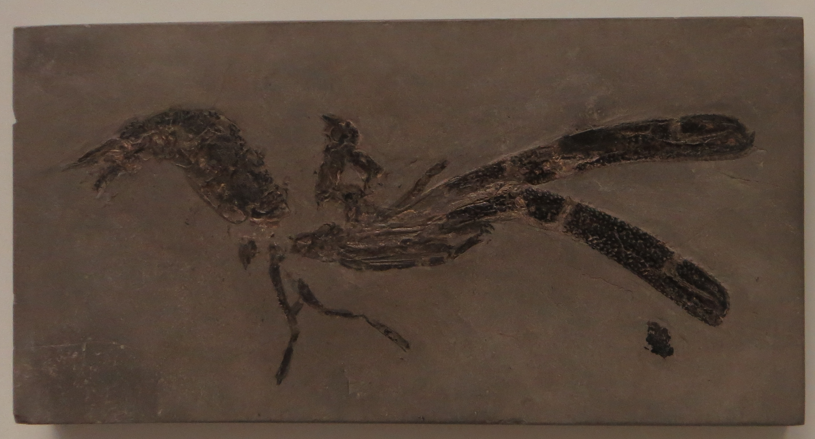 Fossil of Uncina- Took the picture at Museum am Lowentor, Stuttgart